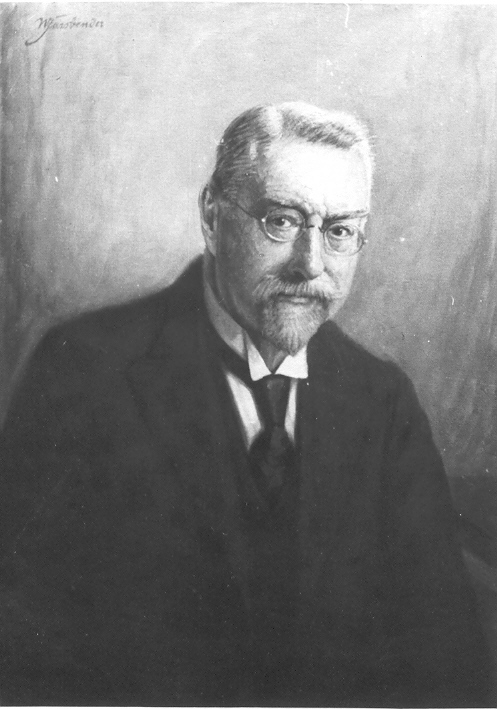 Schwarz-weiß-Kopie eines Ölgemäldes von Robert Bonnet.